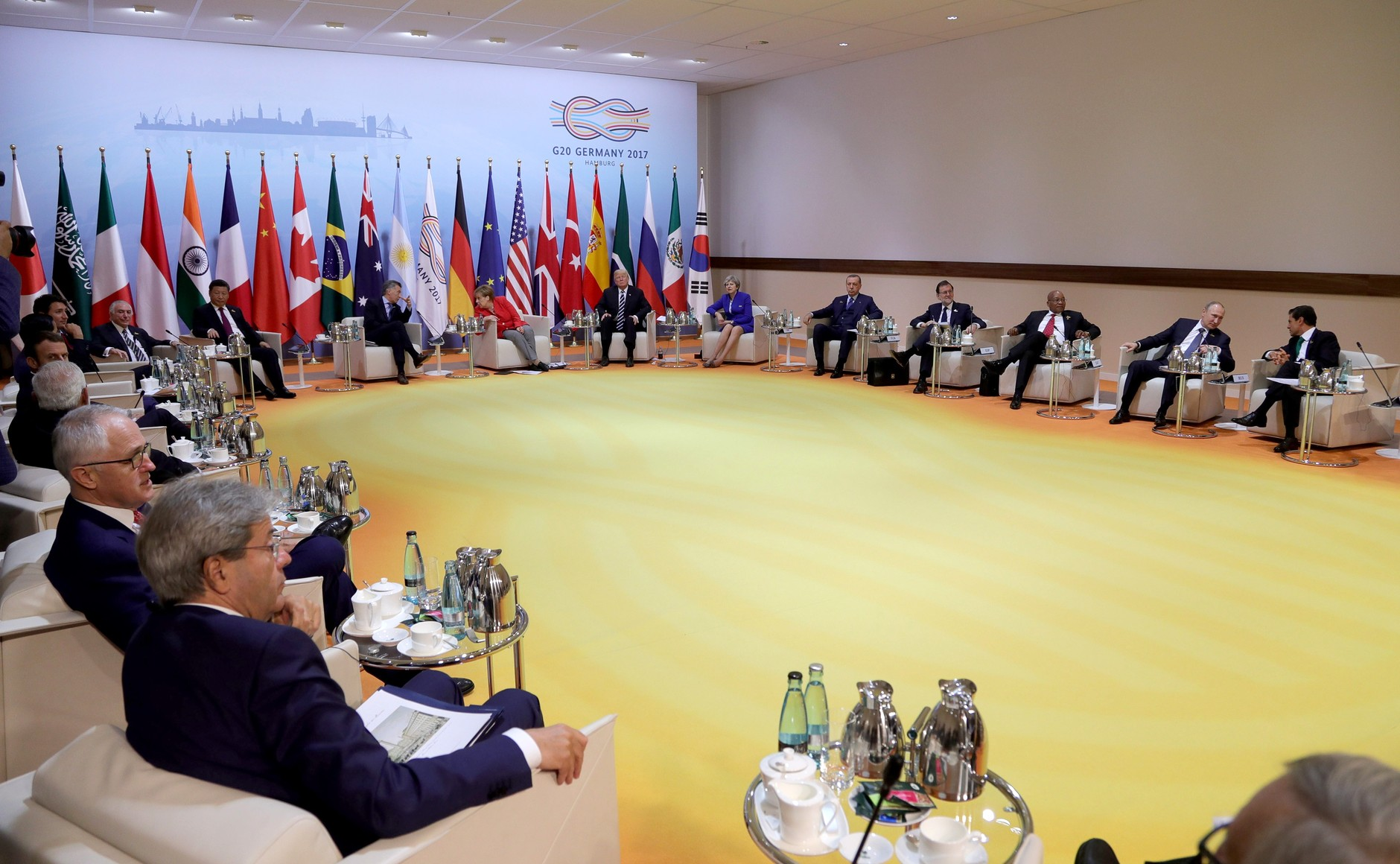 Встреча лидеров «Группы двадцати»